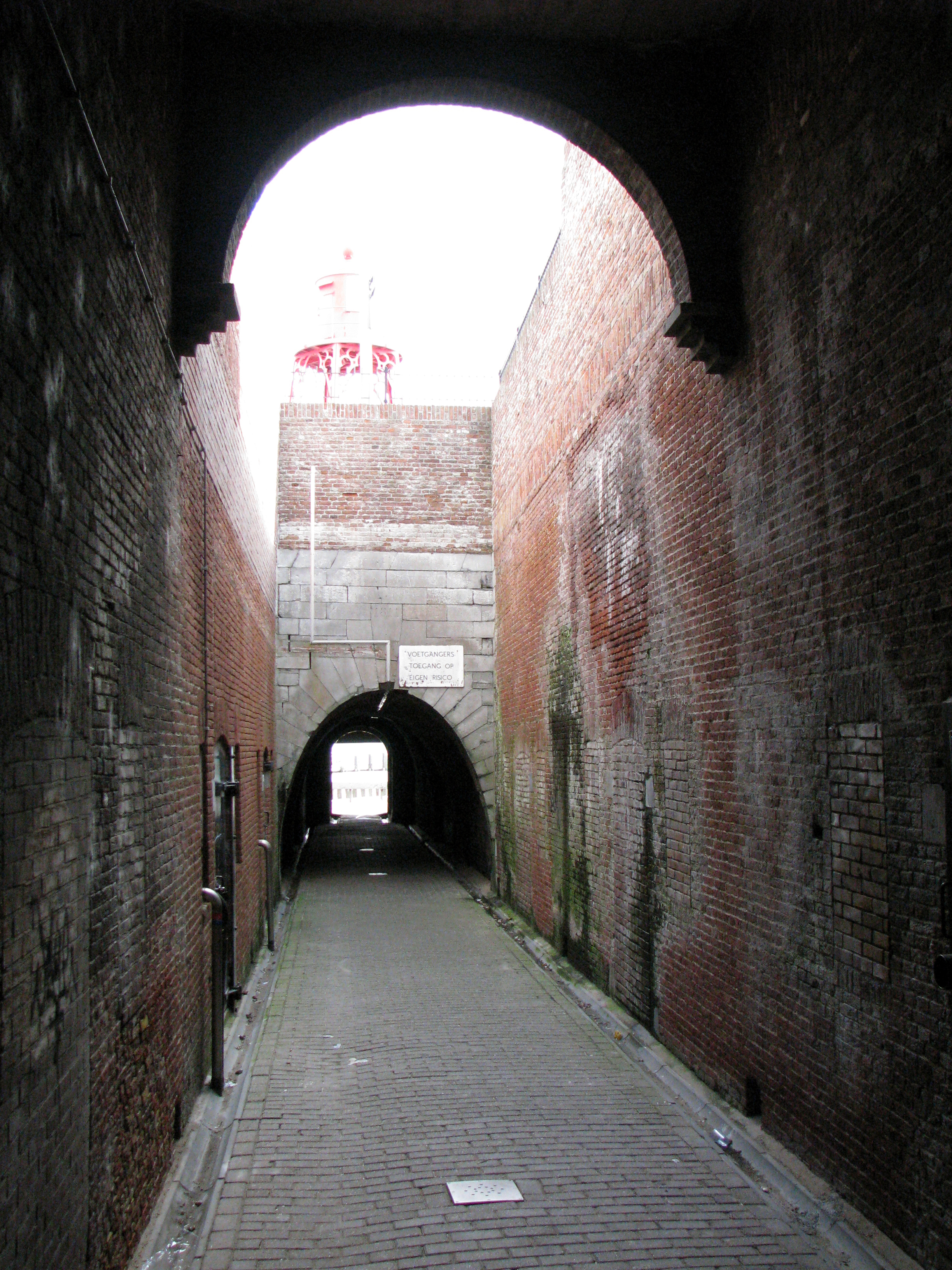 Gang binnen Keizersbolwerk